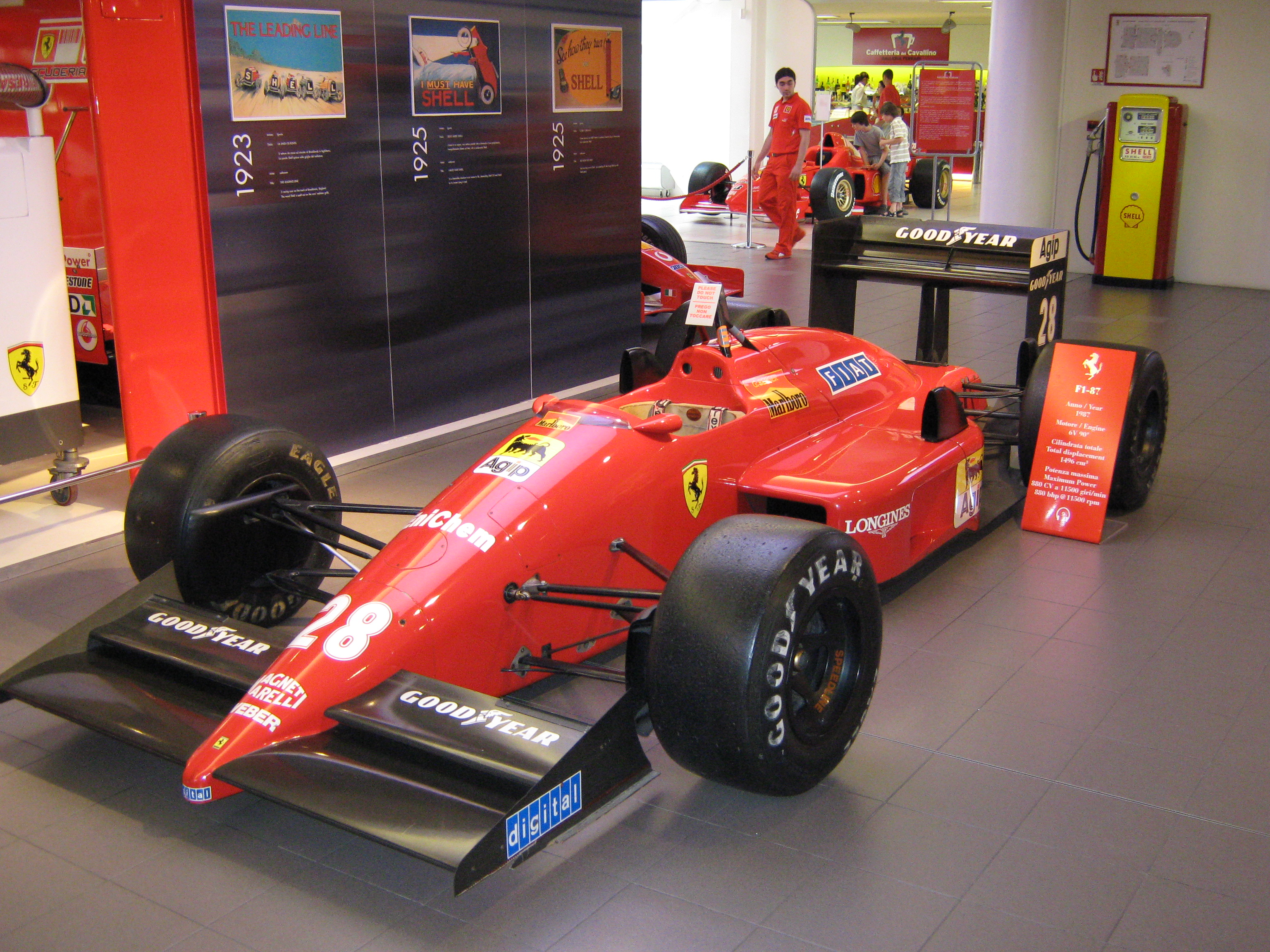 Ferrari F1-87, presso la Galleria Ferrari, Maranello (MO)